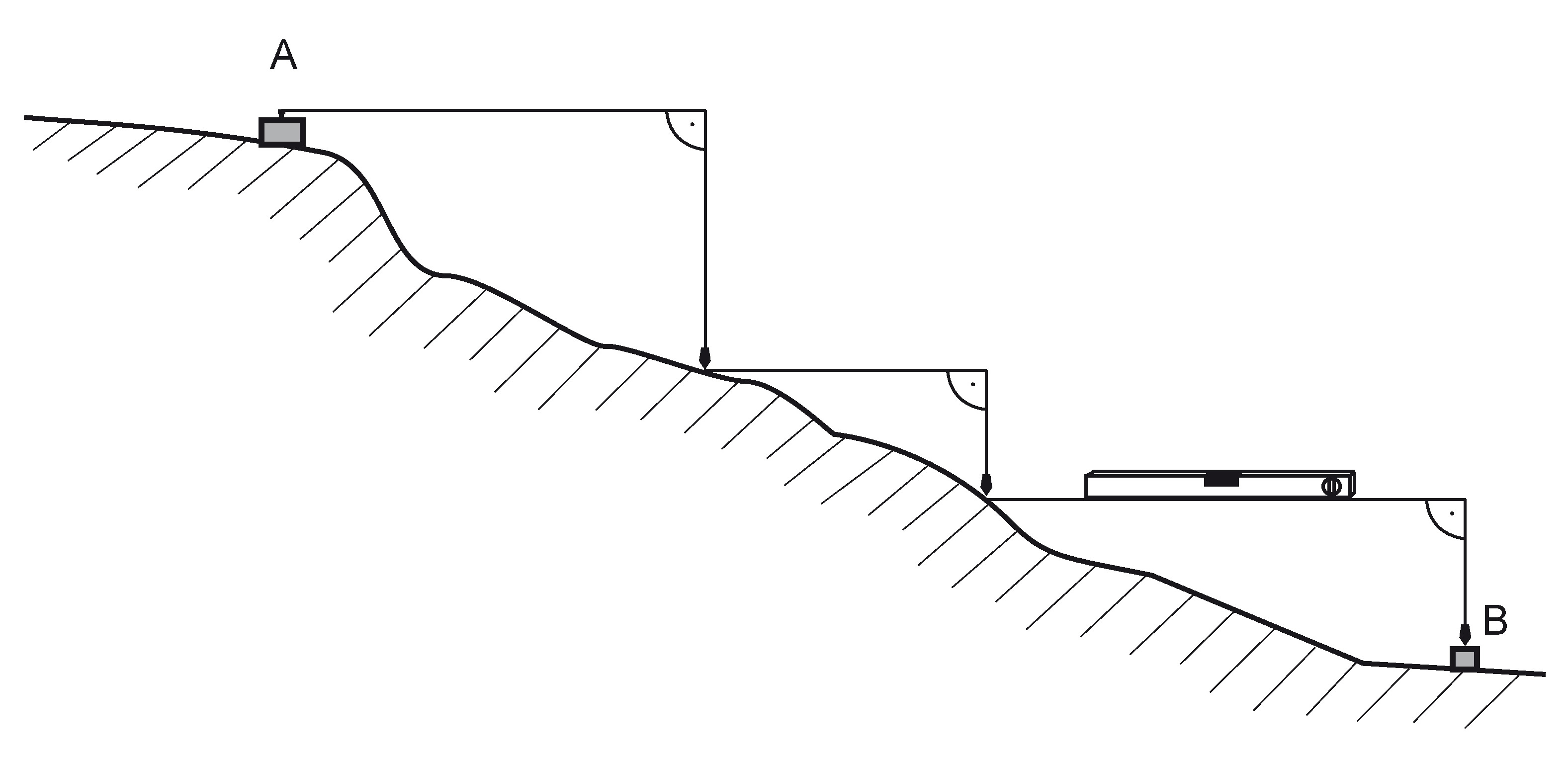 Prinzip der Staffelung (Staffelmessung, Staffelvermessung), einer Methode der mechanischen Längenmessung